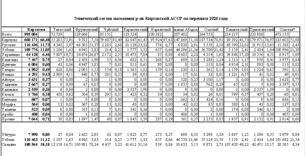 Перепись 1926